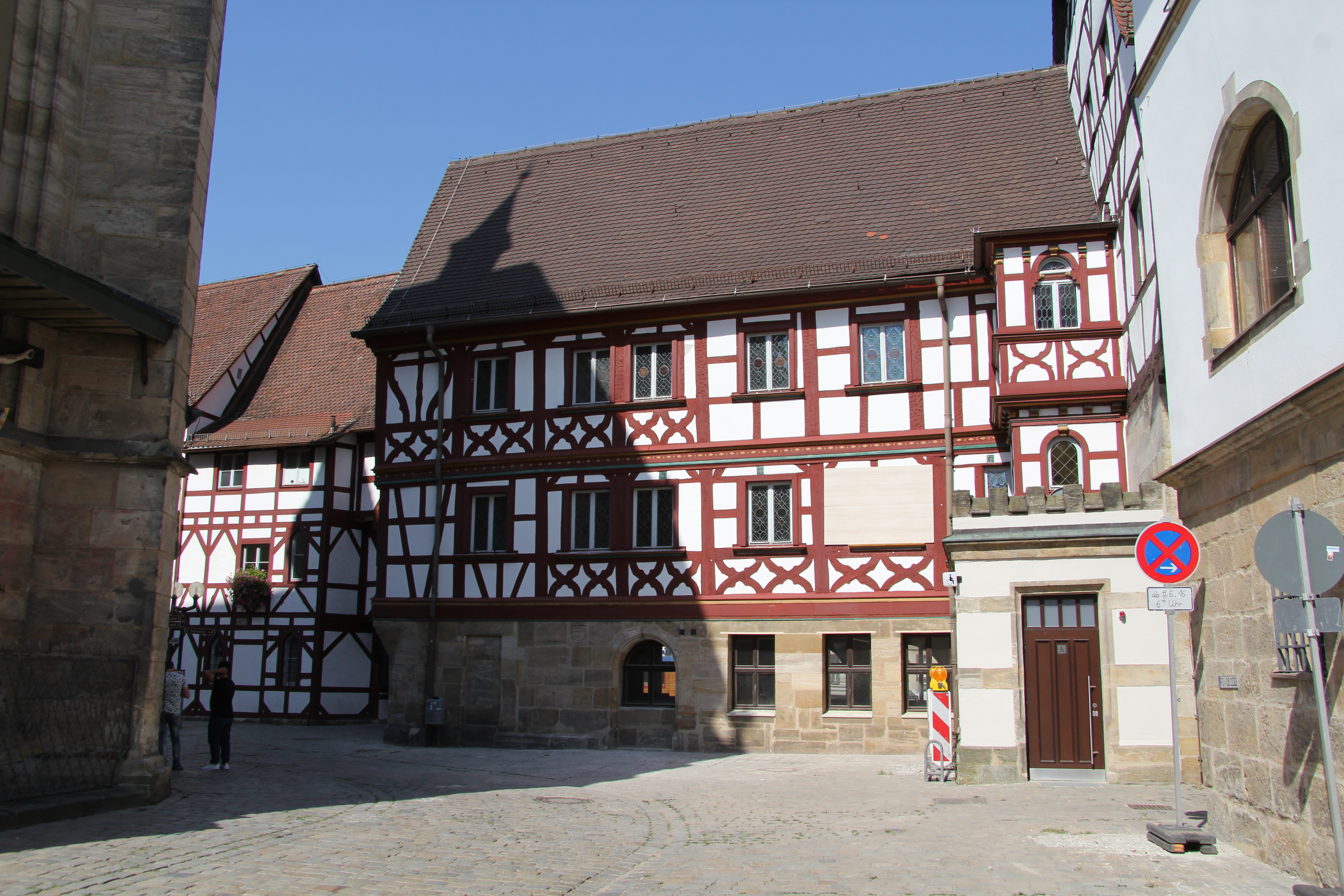 Forchheim Rathaus Magistratsbau RückseiteThis is a photograph of an architectural monument.